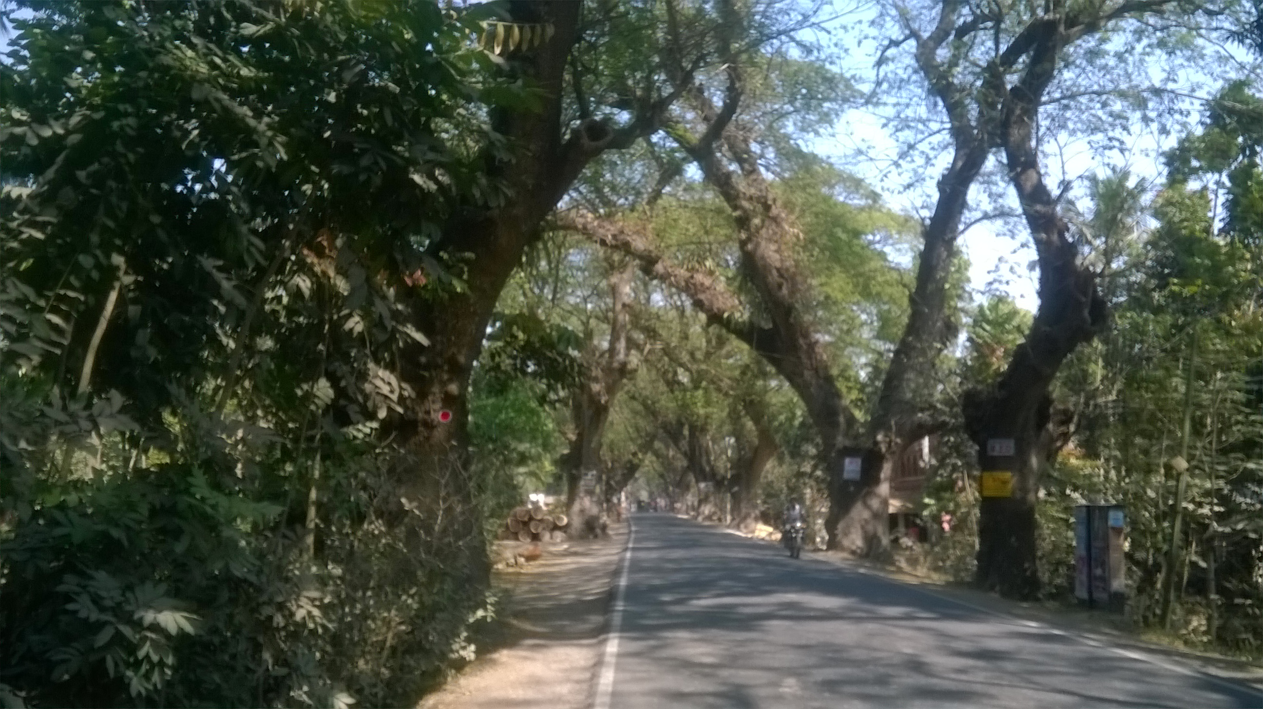 যশোর রোড , বনগাঁ